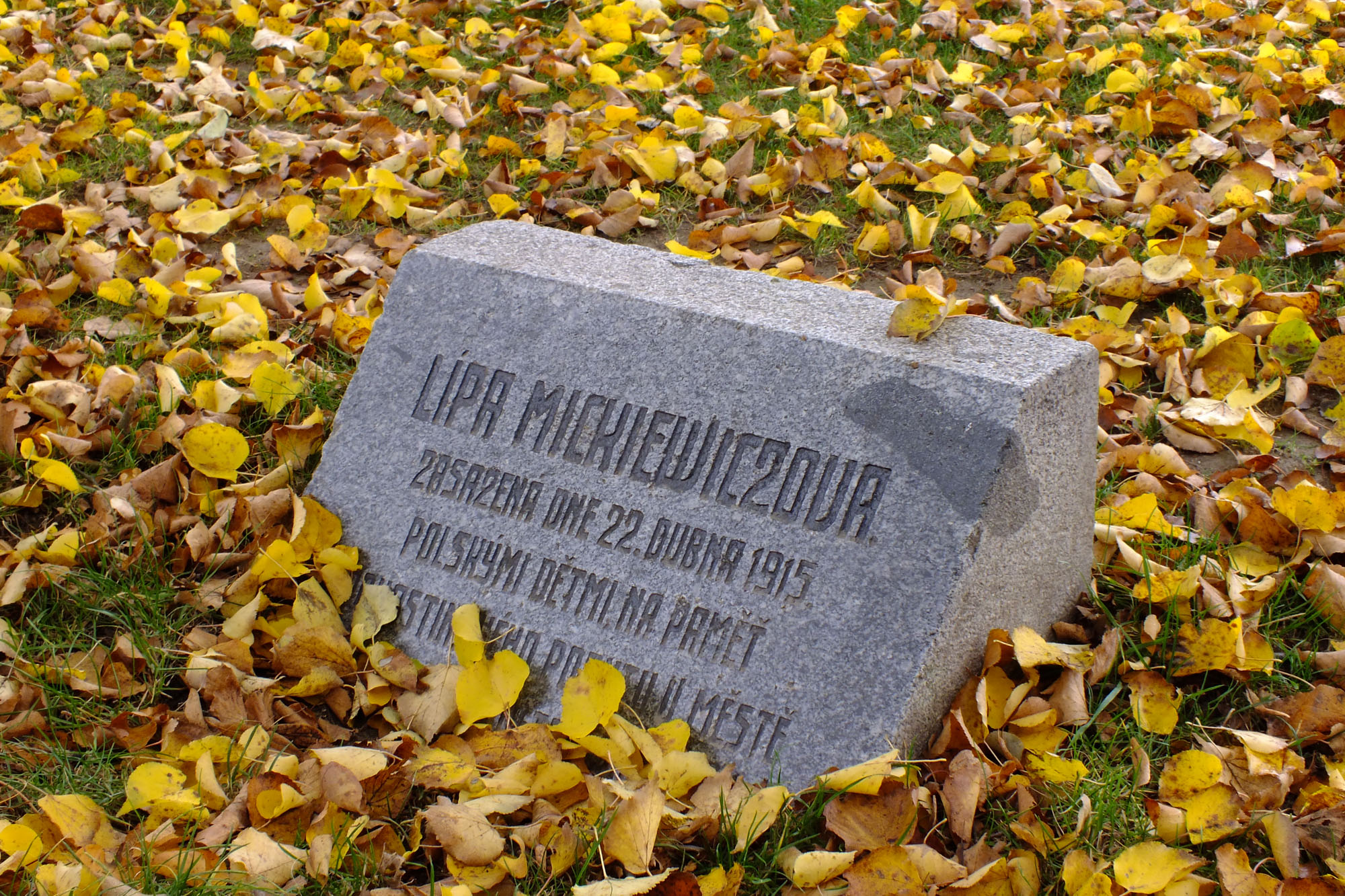 Pamětní deska v Borském parku, Plzeň